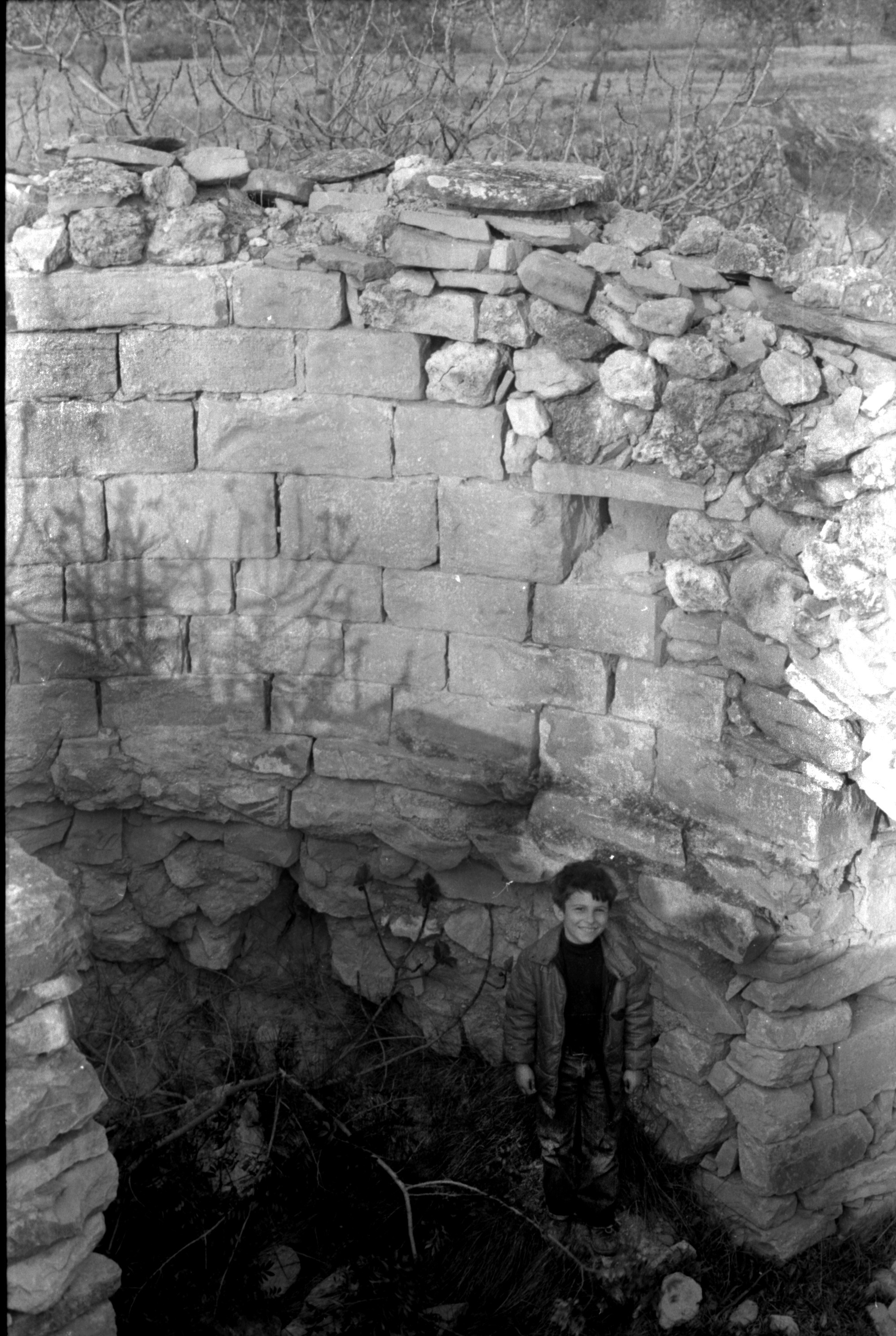 Sant Pere del Pinetell (Montblanc), restes de l'absis de l'església del s. XII. (Fot. J. Fuguet)